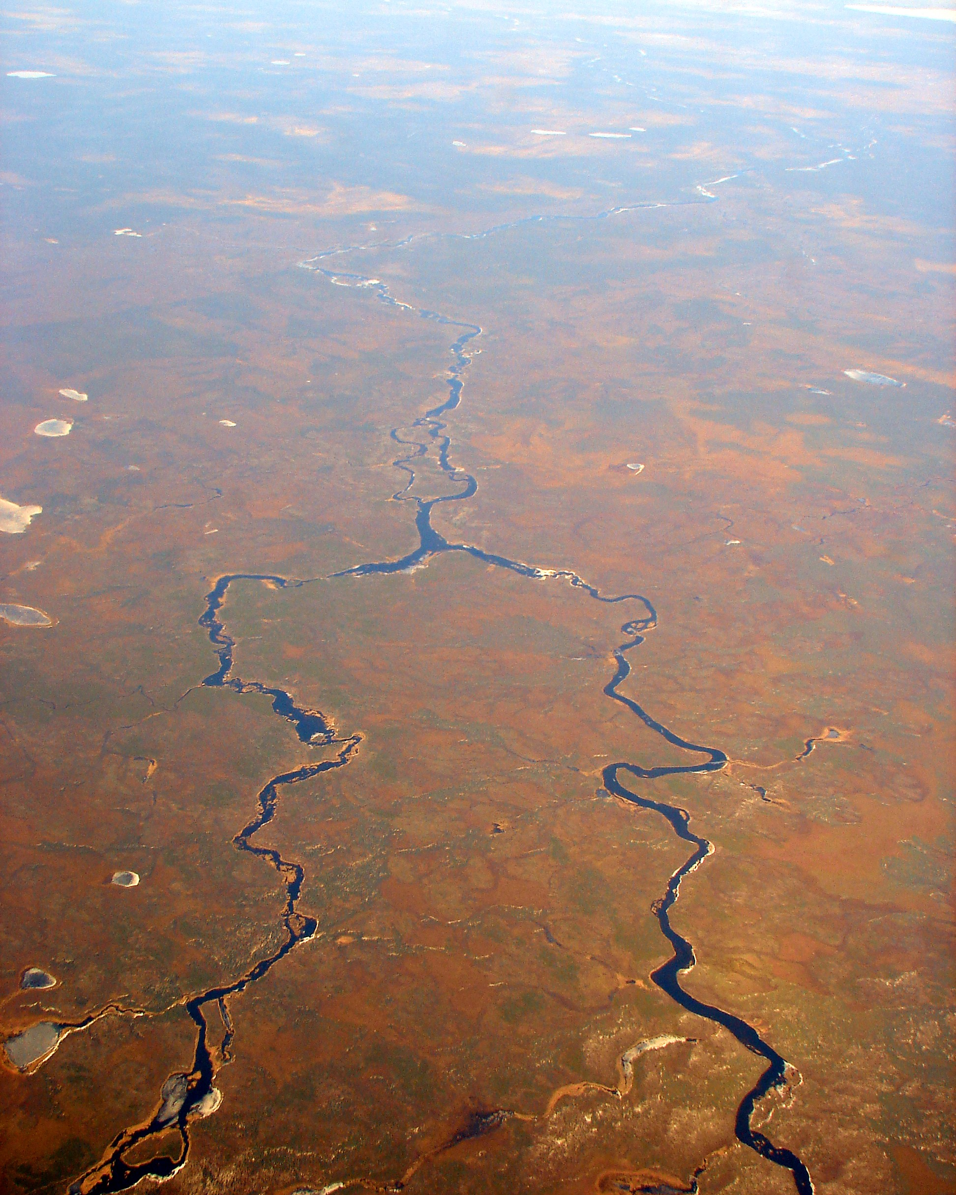 Ogoki River, Ontario, Canada